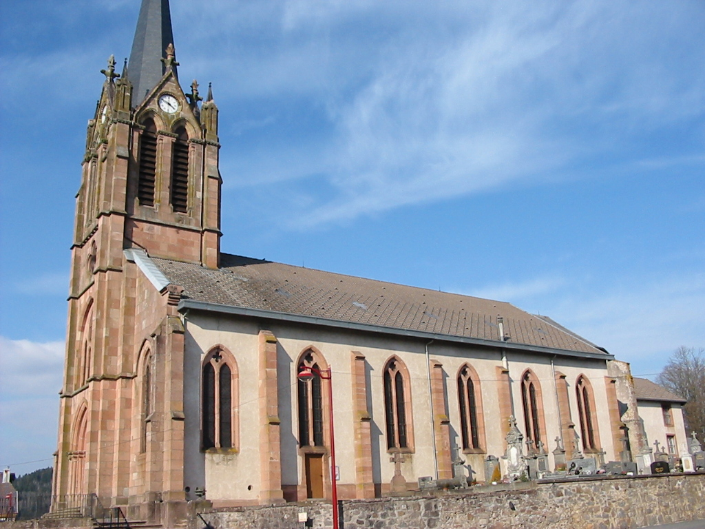 Ban-de-Laveline Commune des Vosges L'église de l'Assomption de Notre-Dame Photographie personnelle, prise le 15 mars 2006 Copyright © Christian Amet